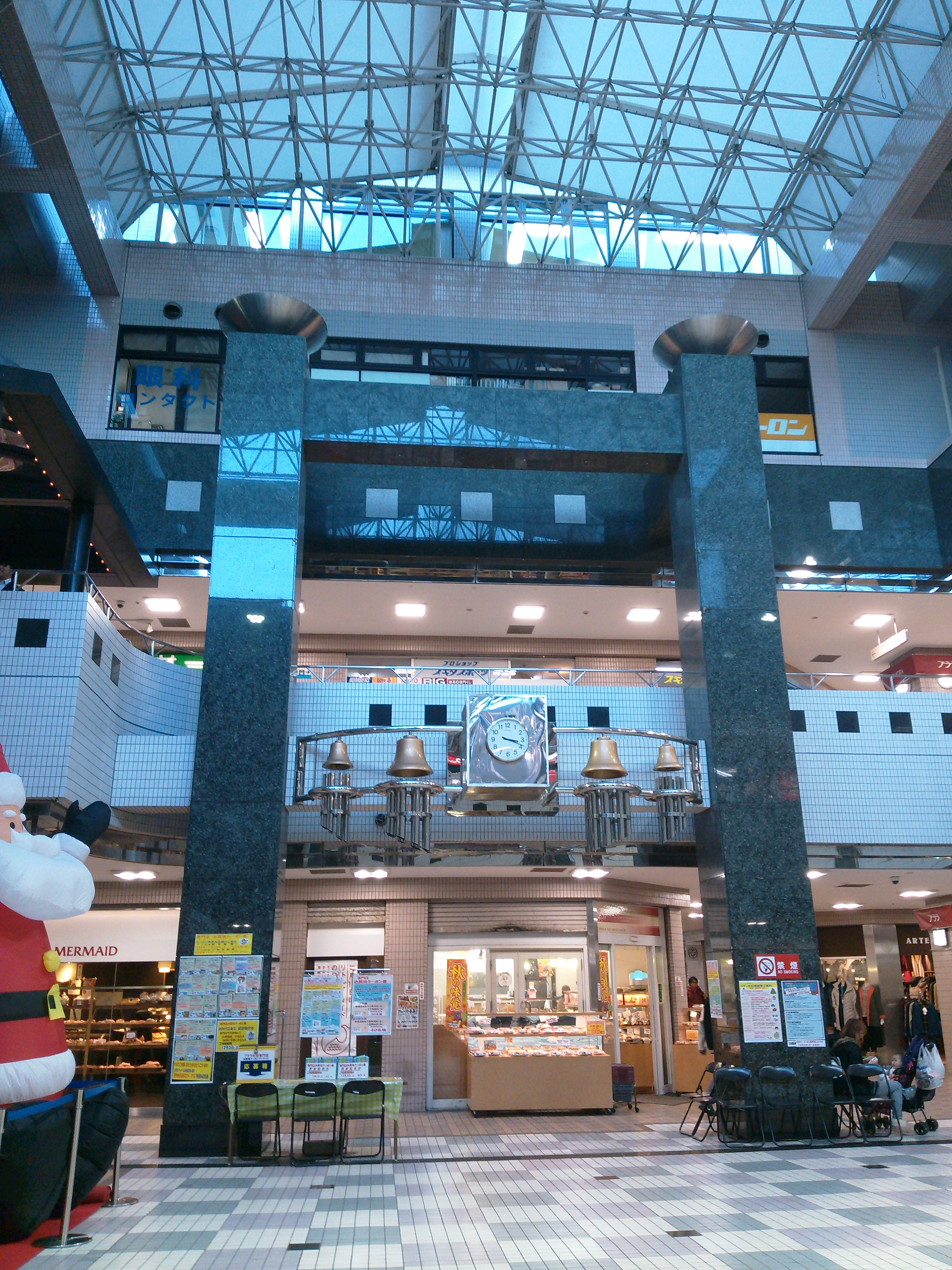 横浜市磯子区、京浜急行杉田駅の駅ビルプララ杉田